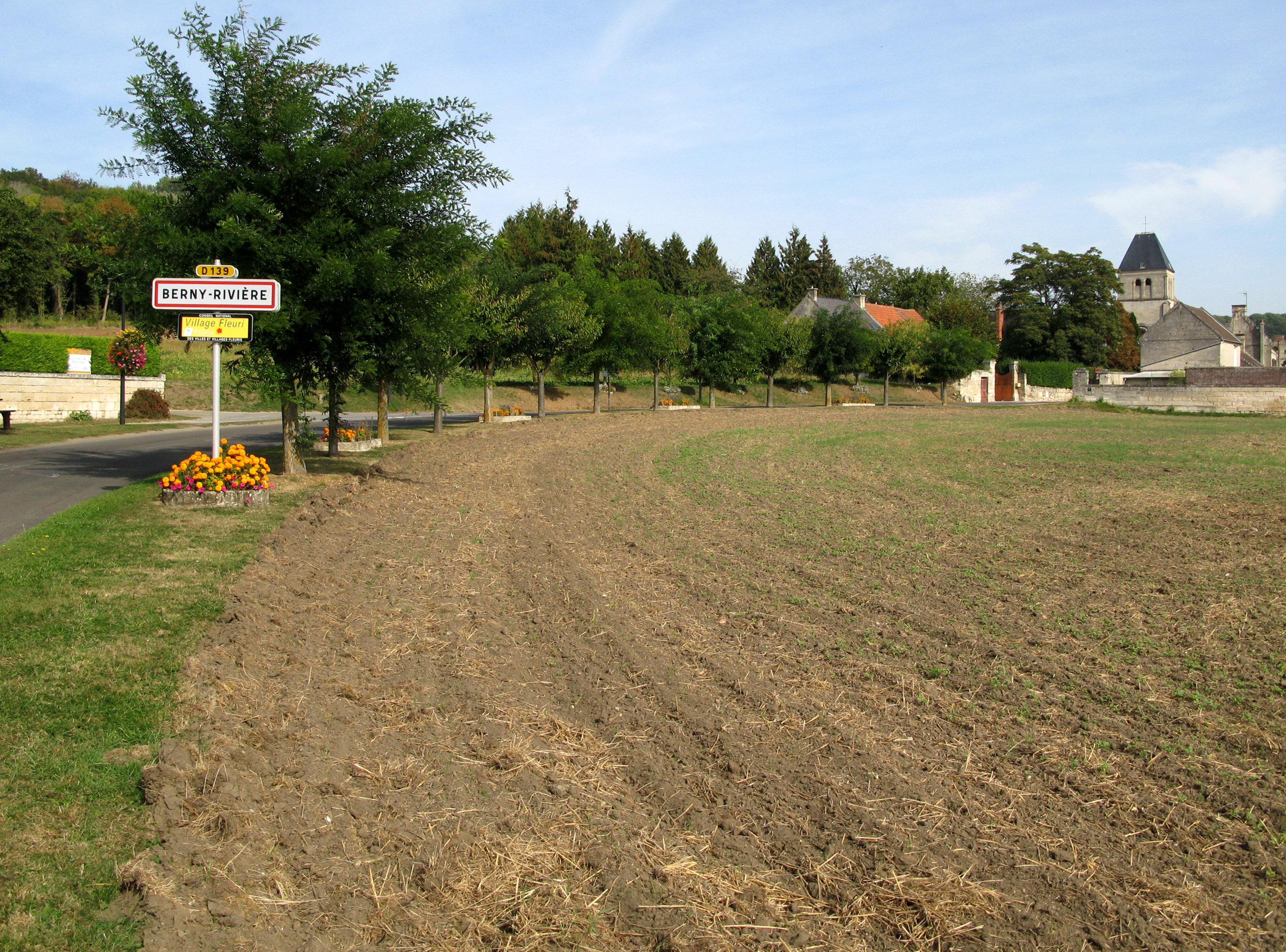 Berny-Rivière (Aisne, France) - L'entrée dans le village. . .